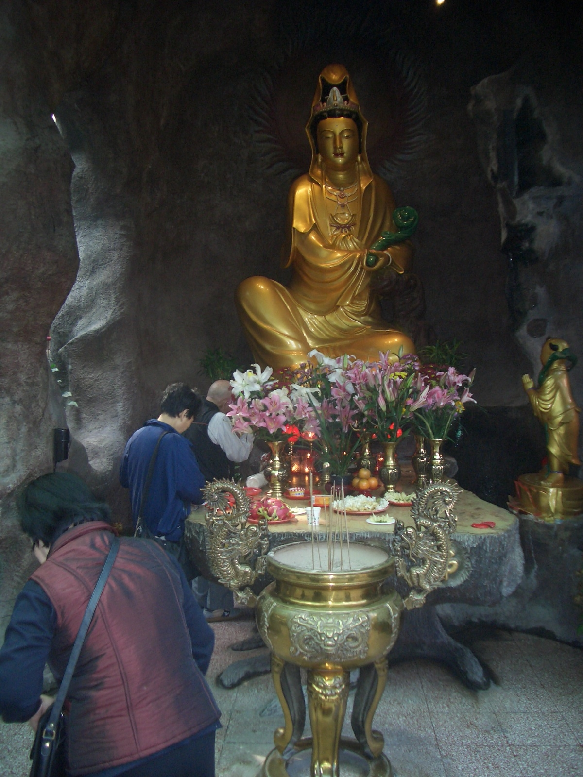 臺灣省城隍廟觀音雕像。